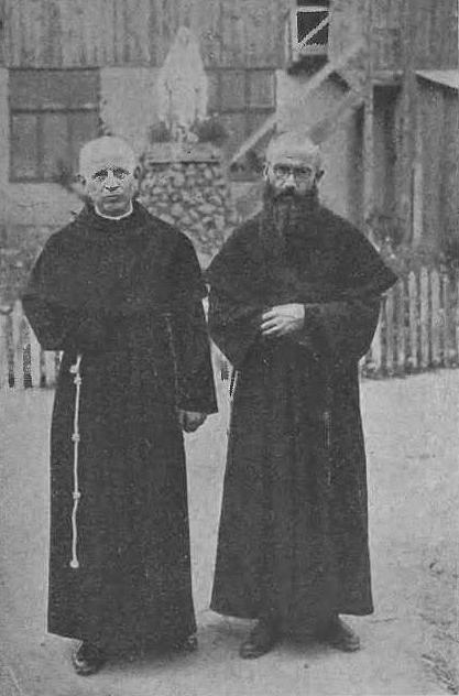 o. Korneli Czupryk i o. Maksymilian Kolbe przed wyjazdem do Japonii w 1933 roku